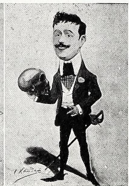 Plantilla de Blanco y Negro.